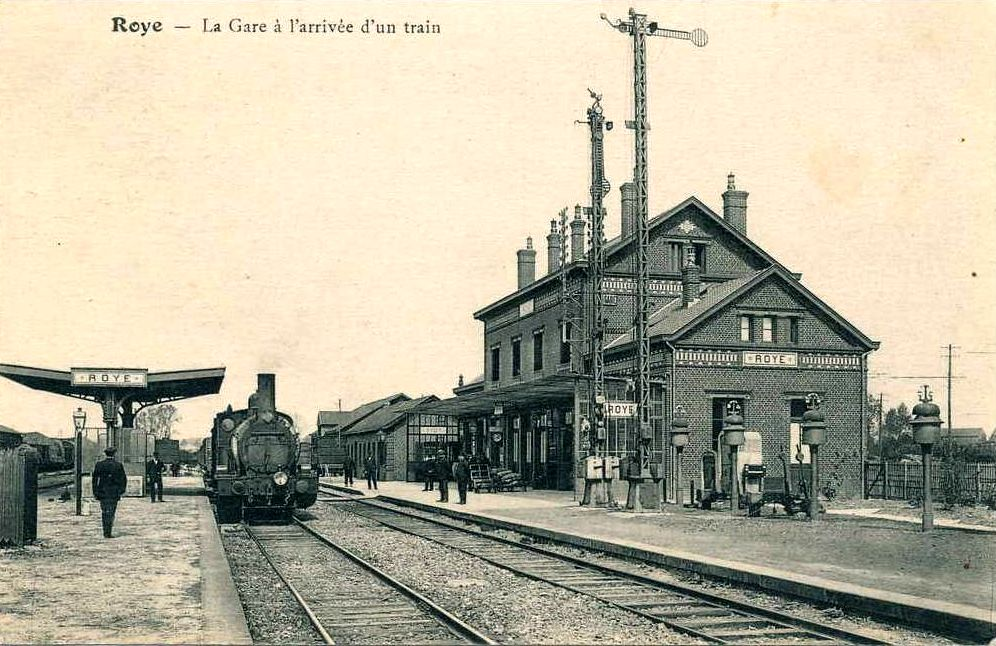 La nouvelle gare de Roye. Elle a été construite avant la Première Guerre mondiale : en effet, des photos montrant ce bâtiment-voyageurs avec les dégâts de guerre existent. Après les bombardements subies, elle a été reconstruite pratiquement à l'identique.